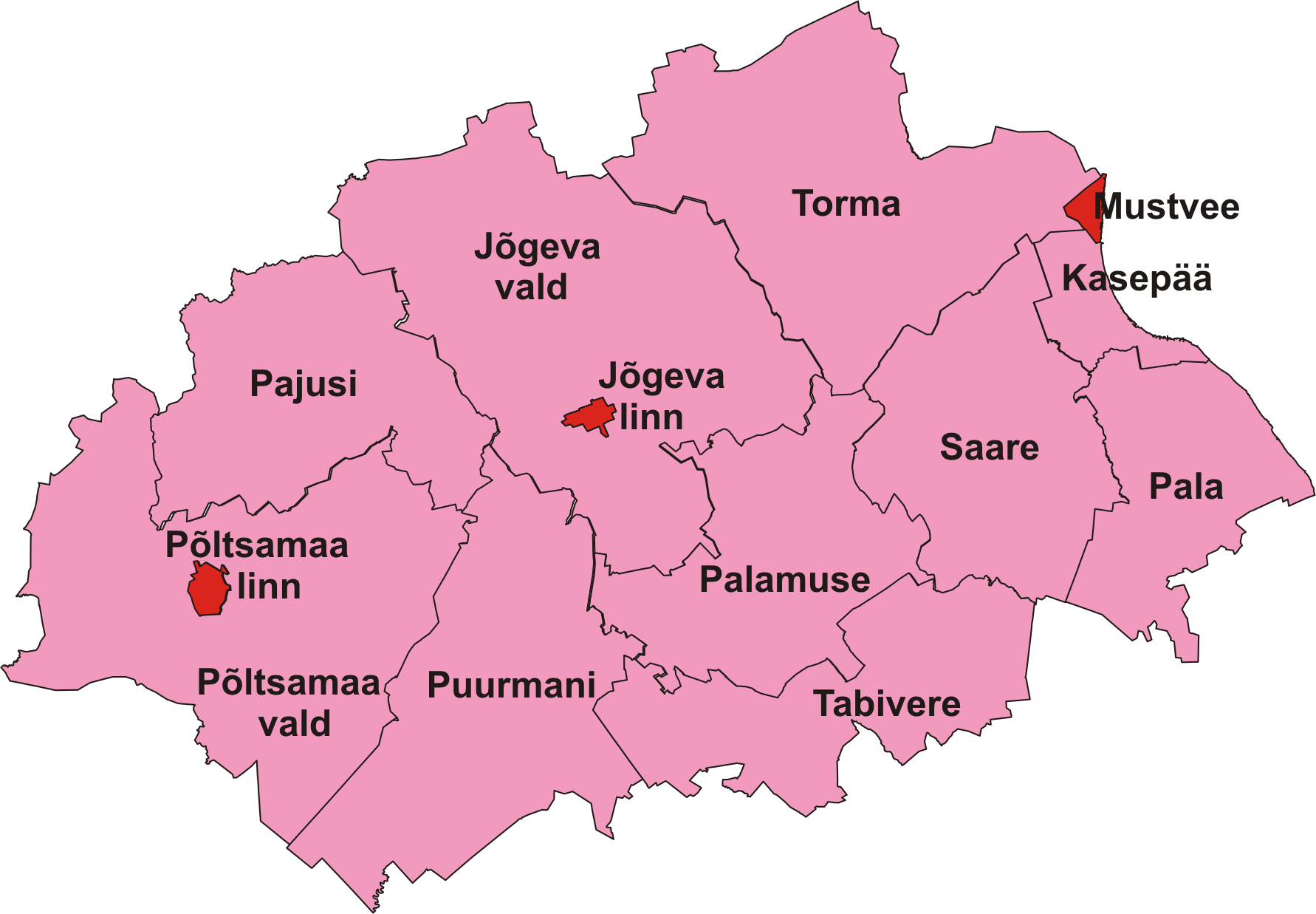 Jõgeva maakonna kaart.